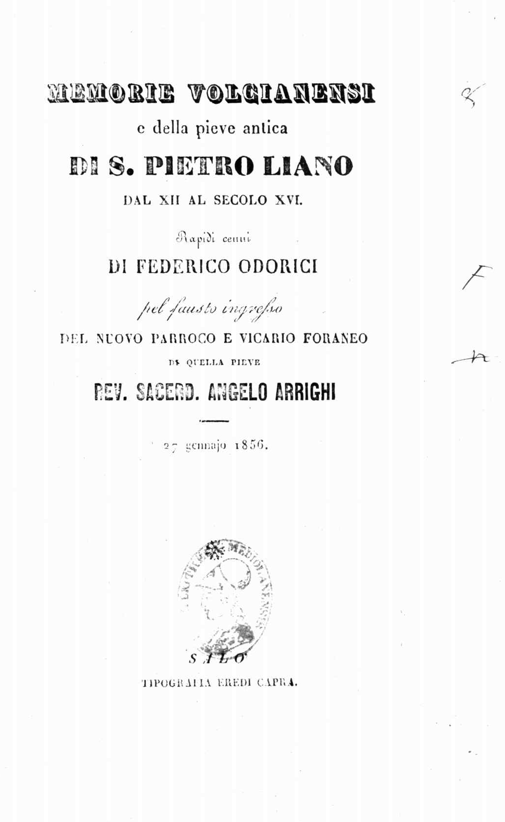 Frontespizio